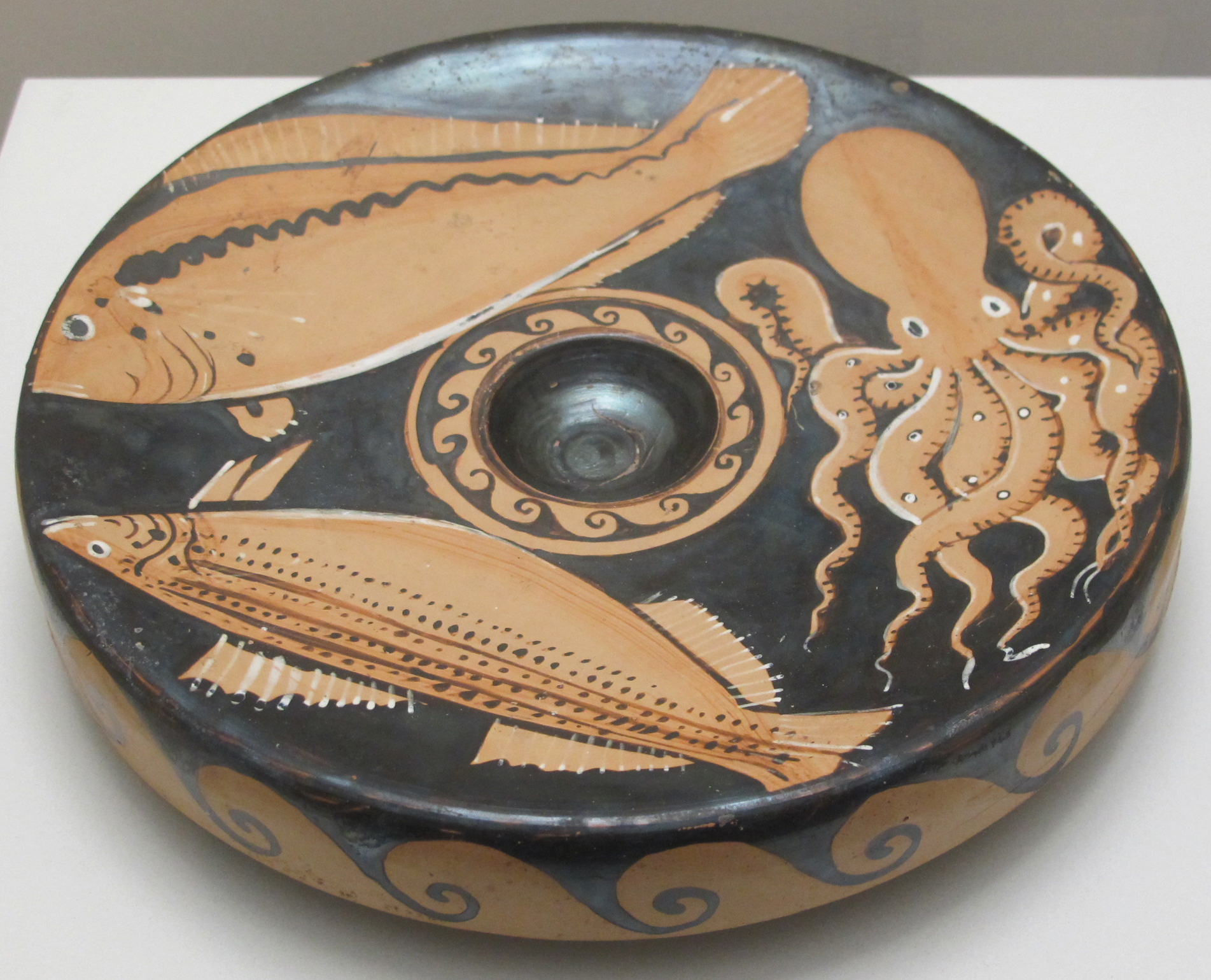 Campania, piatto per pesce, 325-290 ac. ca Grassimuseum Lipsia